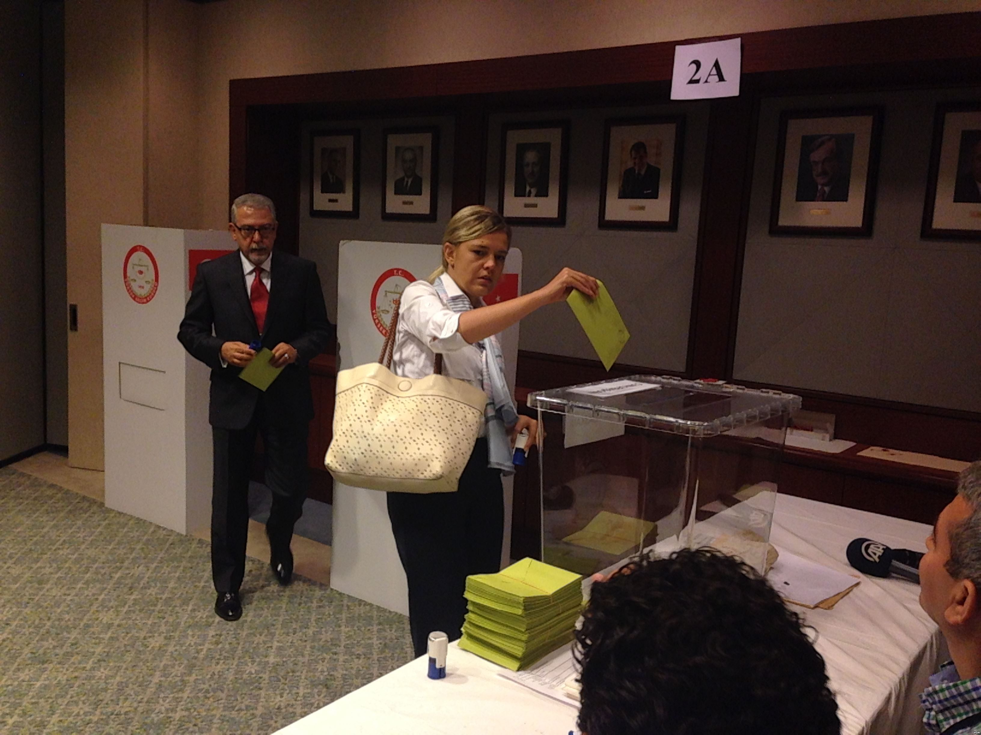 Washington Türkiye Büyükelçiliğinde 2014 cumhurbaşkanlığı seçimi için oy veren Türk vatandaşları.